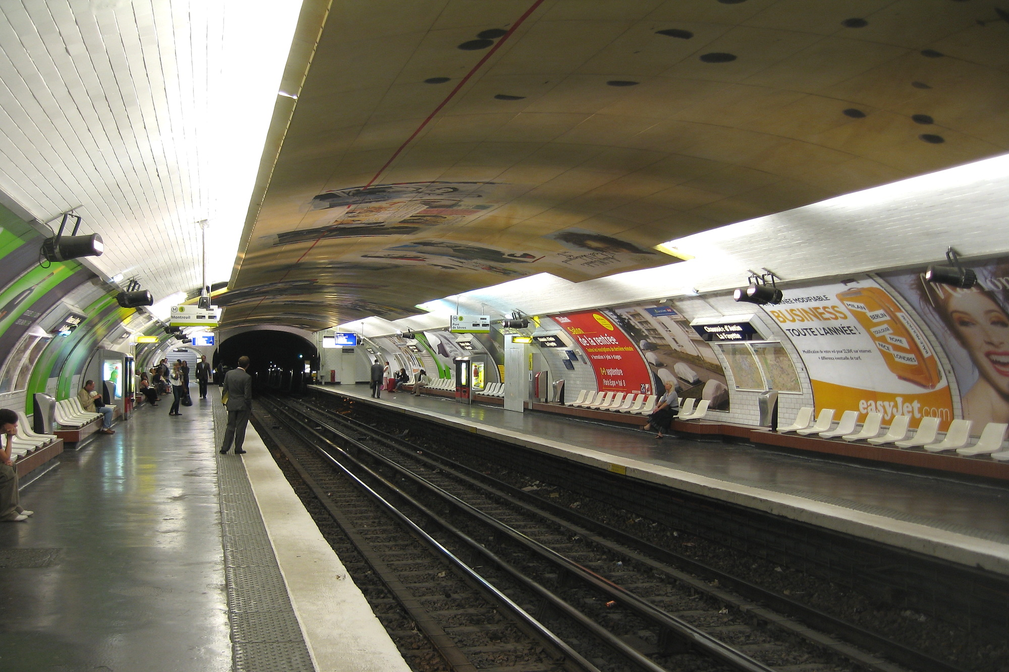 Quais de la station Chaussée d'Antin - La Fayette de la ligne 9 du métro de Paris vus en direction de Pont de Sèvres.